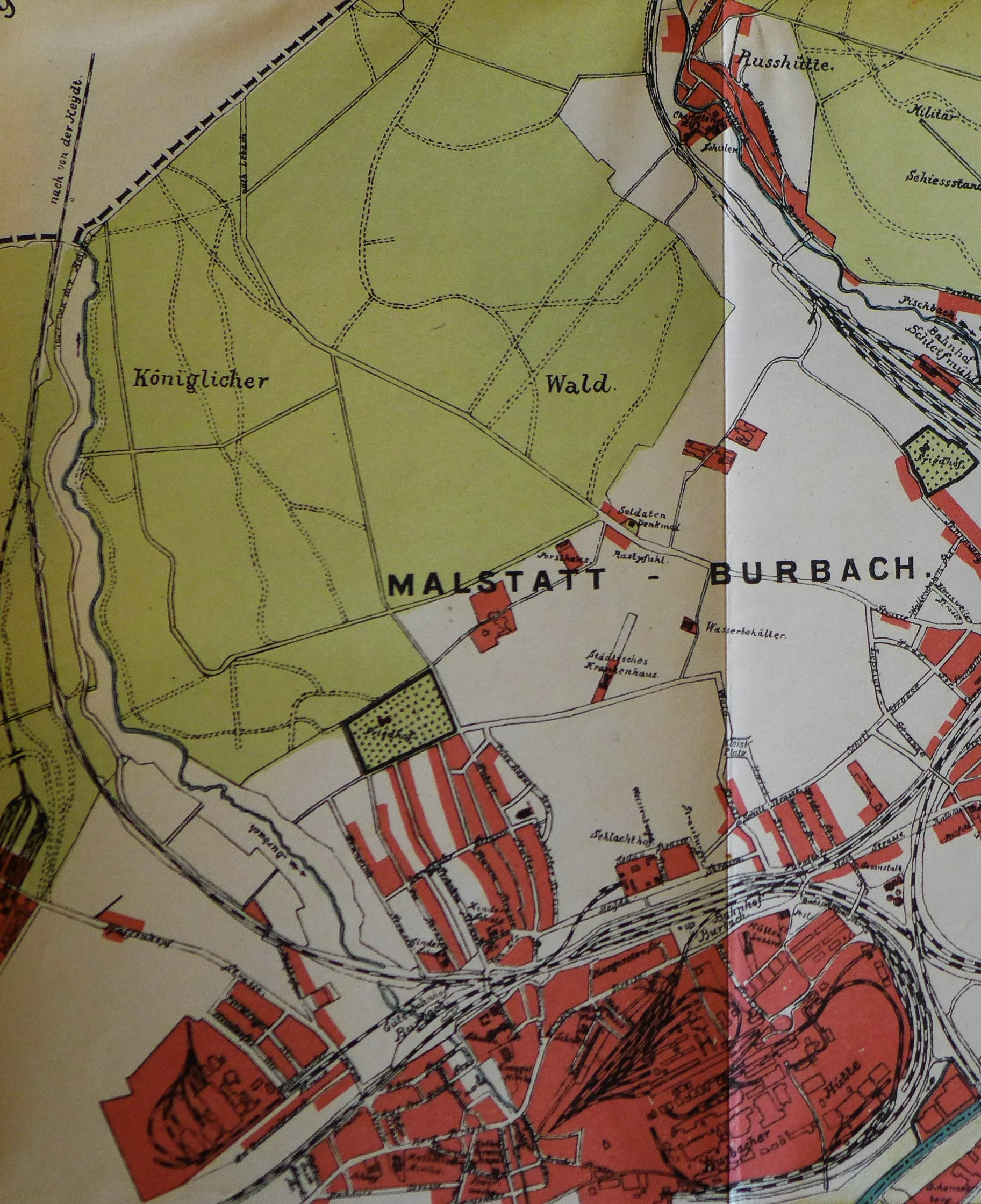 Der Rastpfuhl in Malstatt und der Königliche Wald zu Beginn des 20. Jahrhunderts (Albert Ruppersberg: Geschichte der ehemaligen Grafschaft Saarbrücken, 4 Bände, Saarbrücken 1908–1914, Band 4, Übersichtskarte.)